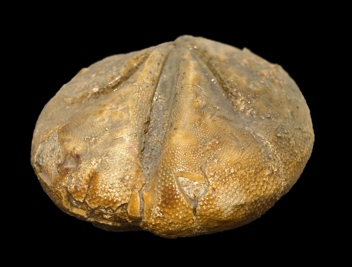 Babes Bolyai paleontology museum